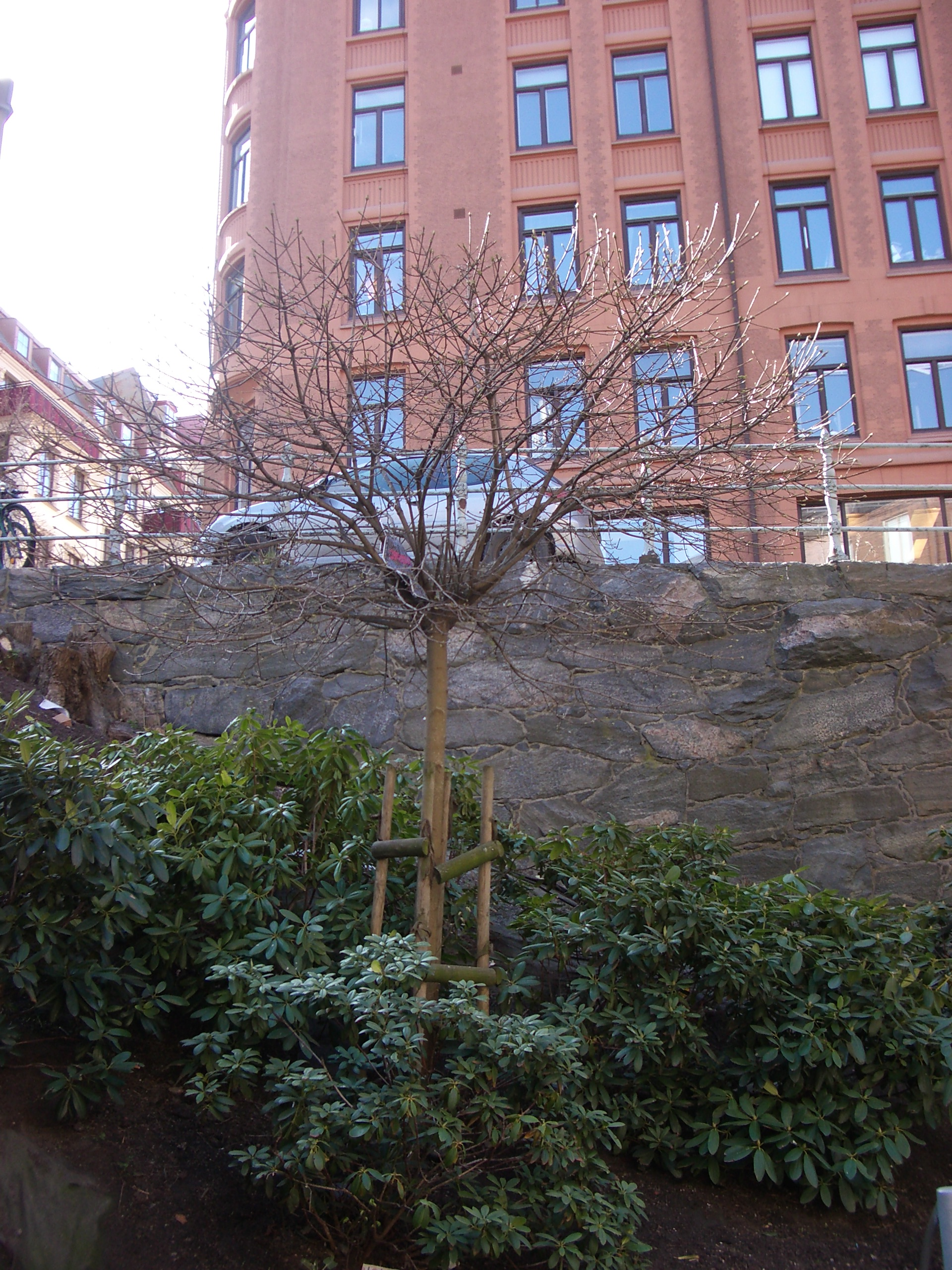 Denna poppel är planterad vid Kaserngränden där Hvitfeldts- och Kungshöjdsgatorna skär varandra.